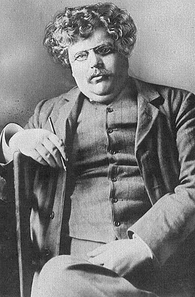 Writer G. K. Chesterton